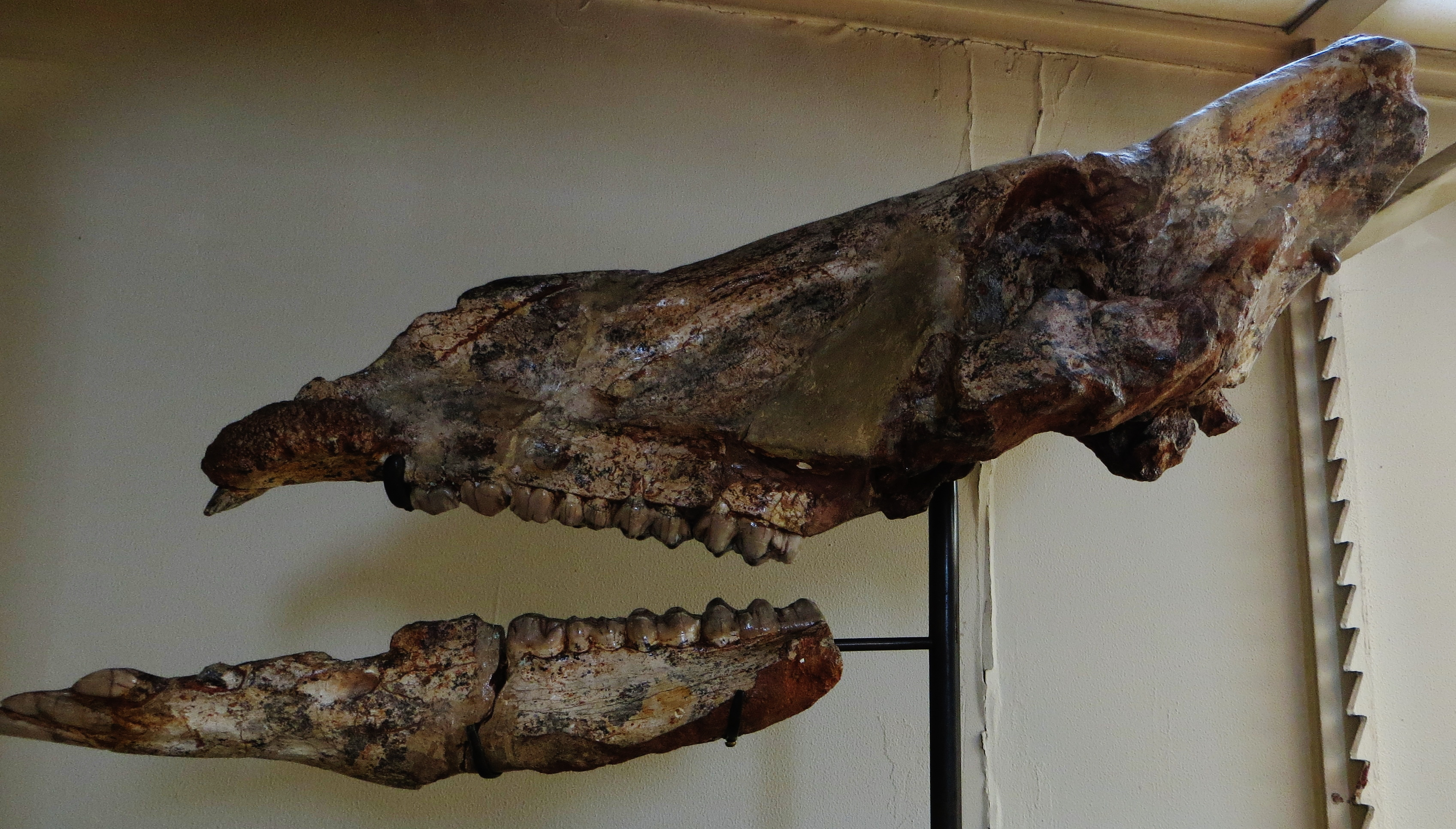 Fossil of Microsthonyx, an extinct mammal- Took the photo at Musee d'Histoire Naturelle, Paris